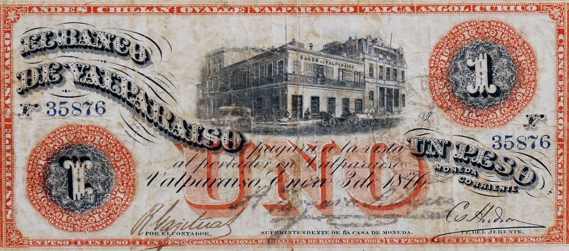 Banco de Valparaiso